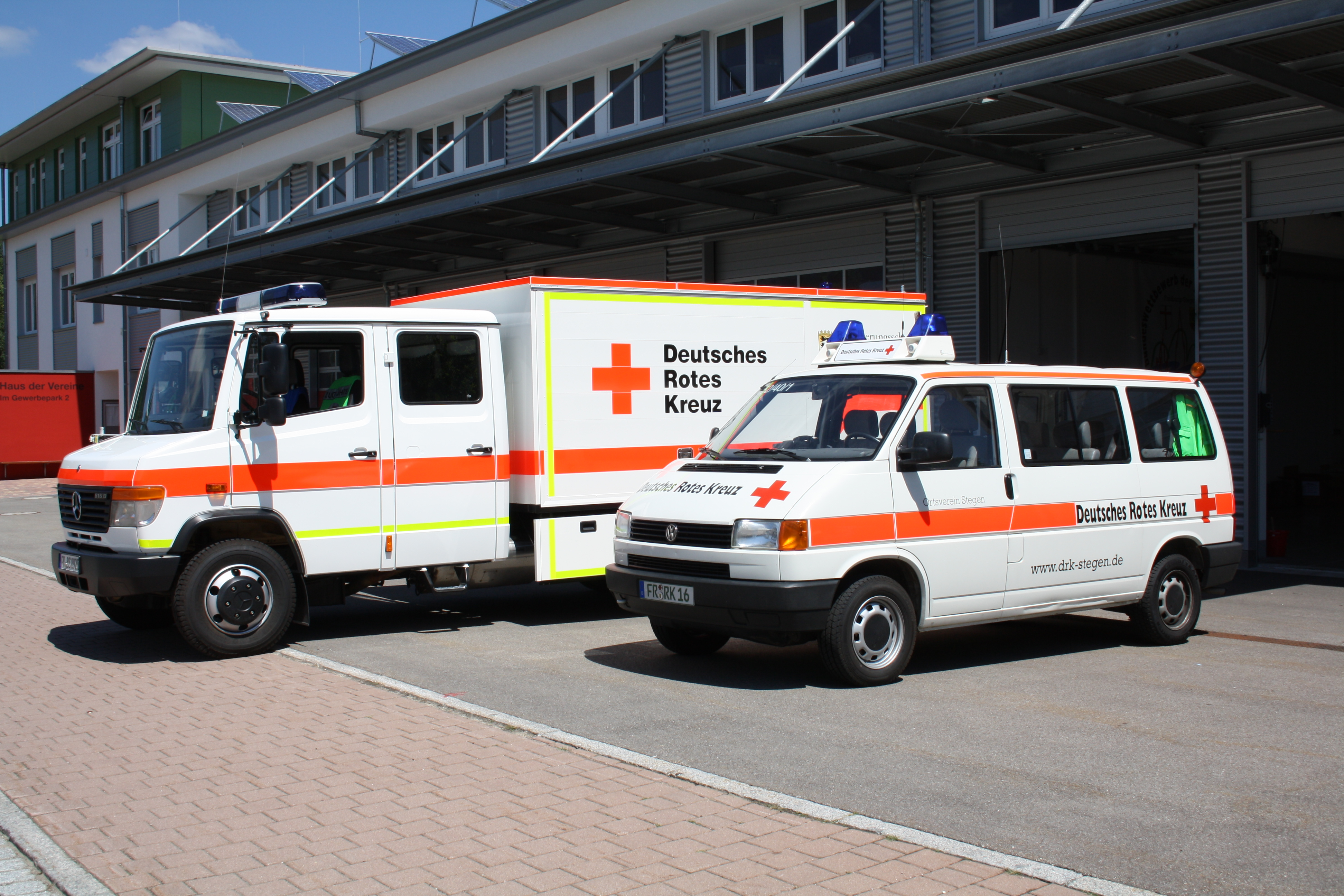 Geraetewagen San des Landes Baden- Württemberg mit MTW